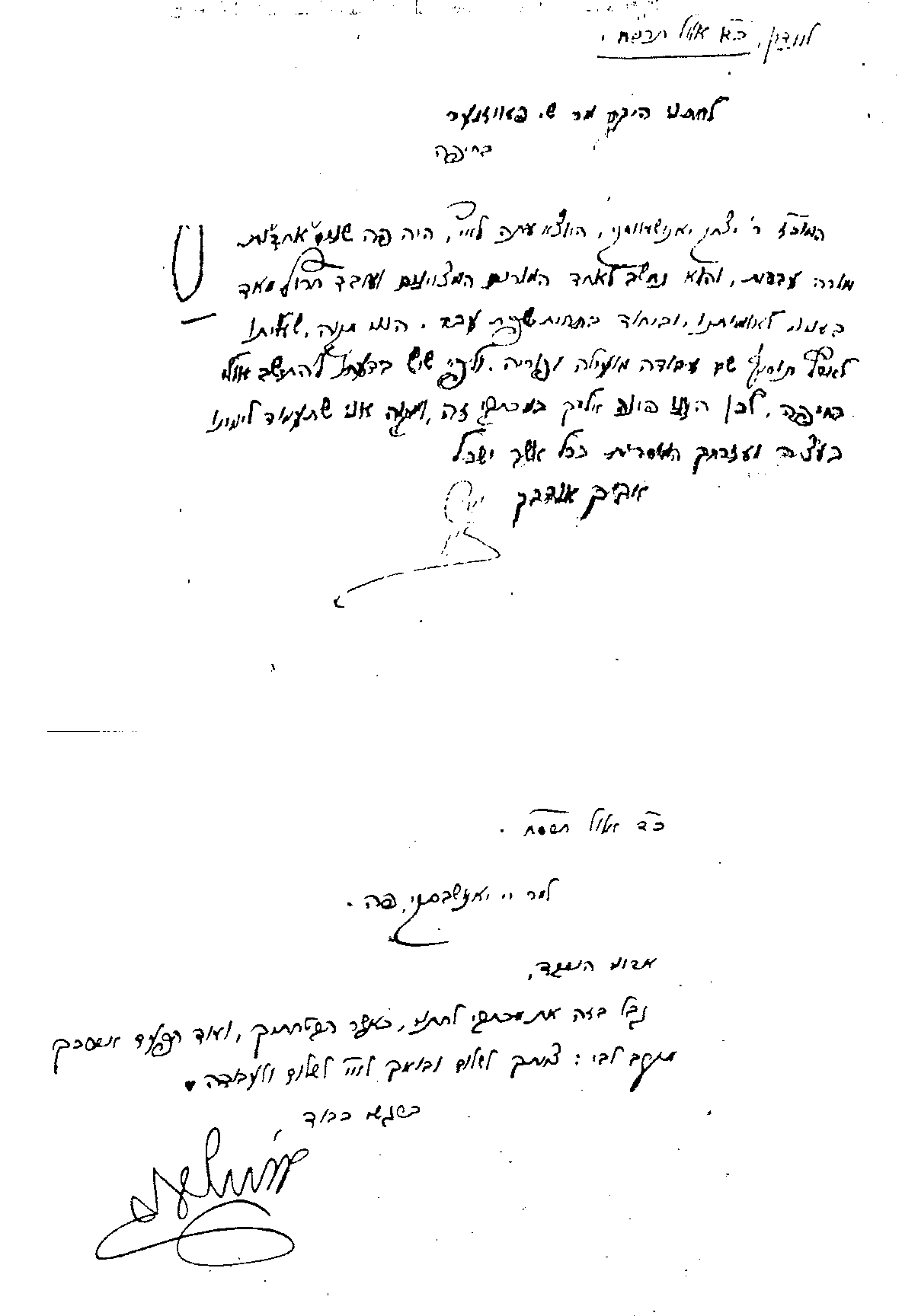 מכתב מאת אחד העם (לונדון) אל חתנו ש"י פבזנר (חיפה), כ"א אלול תרס"ח, המכיל בקשה מאת אחה"ע שפבזנר יעמוד לימינו של יצחק ינישבסקי שבזמן זה עולה ארצה, בצירוף מכתב מאת אחד-העם (לונדון) אל יצחק ינישבסקי (לונדון), כ"ד אלול תרס"ח, אותו שלח אחה"ע כספח יחד עם העתק מכתבו אל פבזנר.